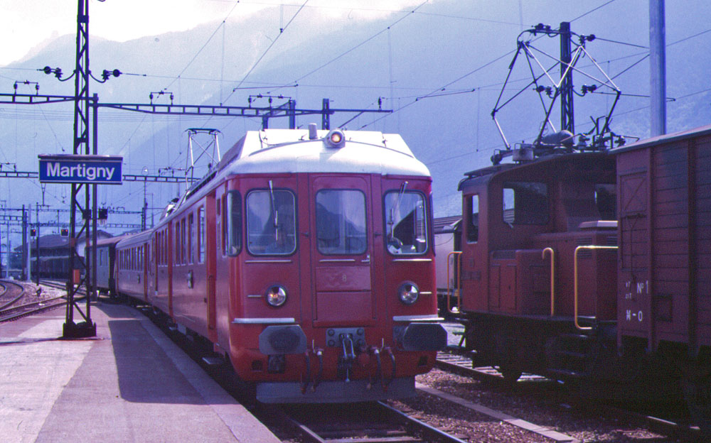 Pendelzug der Martigny–Orsières-Bahn in Martigny.